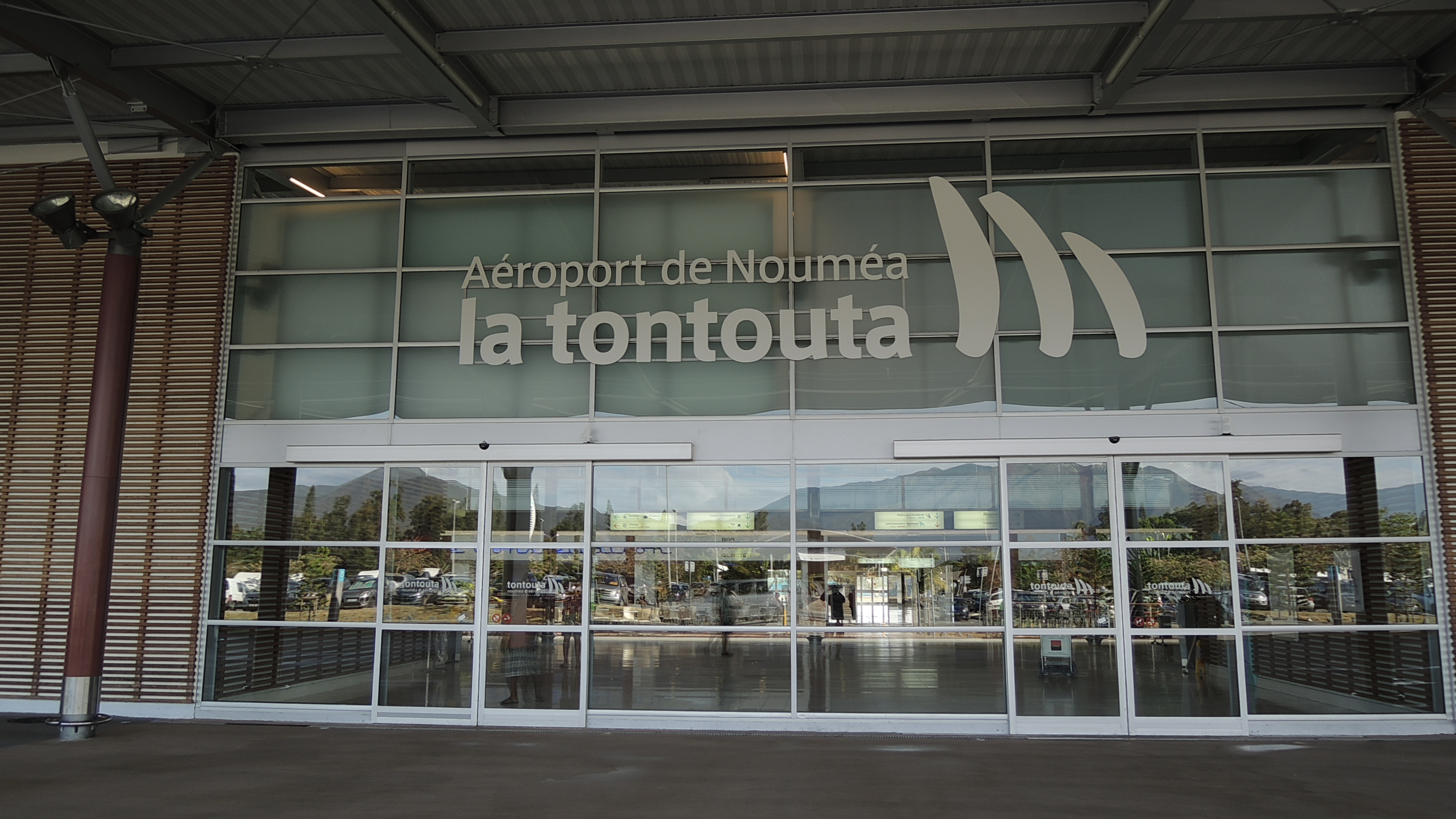 Entrée des visiteurs de l'aéroport